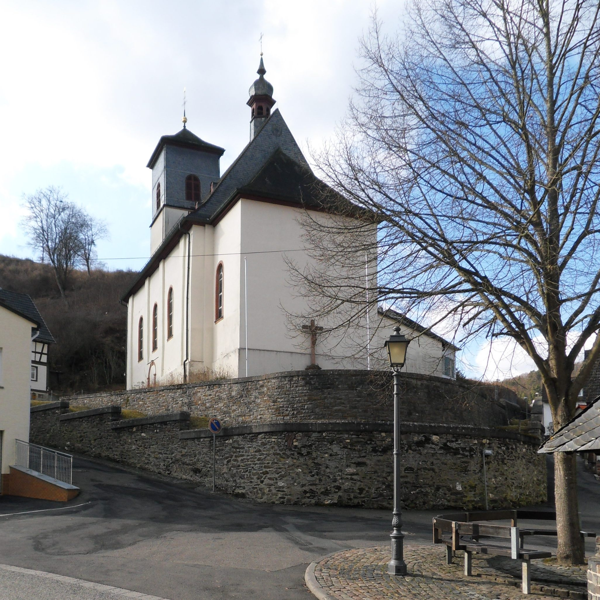 Die katholische Kirche St. Aegidius in Niedergladbach im Taunus, Gemeinde Schlangenbad, Blick von Osten